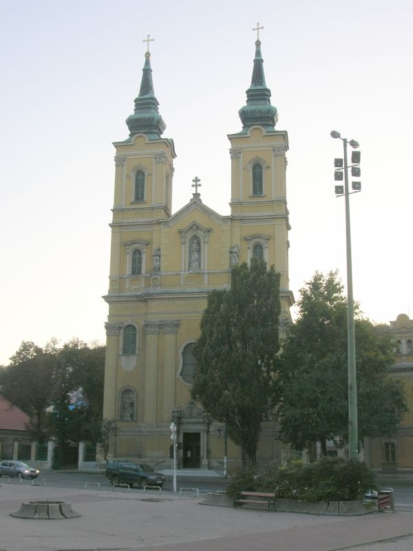 Mindszent Church, Miskolc, Hungary.